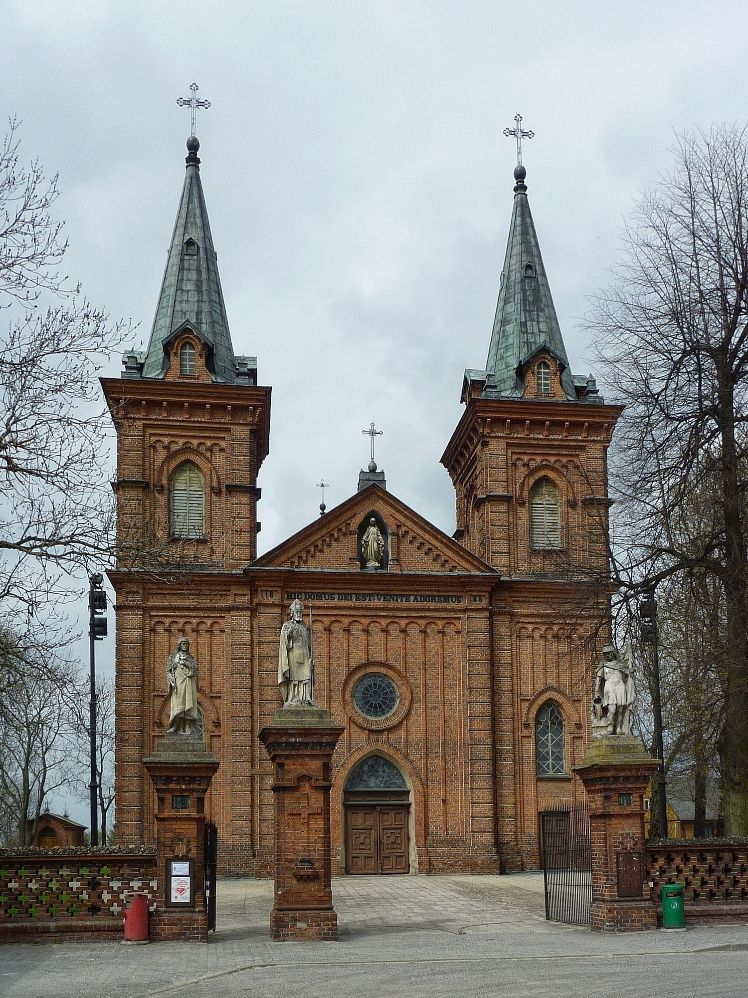 Kościół Wniebowzięcia Najświętszej Maryi Panny w Raciążu.